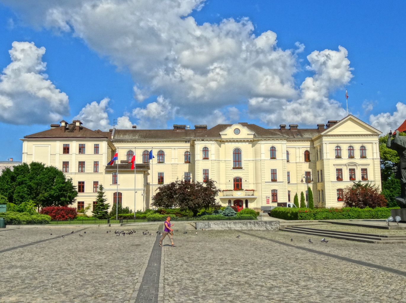 Ratusz w Bydgoszczy przy ul. Jezuickiej/Starym Rynku, dawne Kolegium Jezuickie (XVII w.)